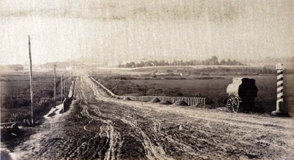 Фотография Владимирского тракта 1858-1862 гг. Фотограф: Ferdinand Bureau.